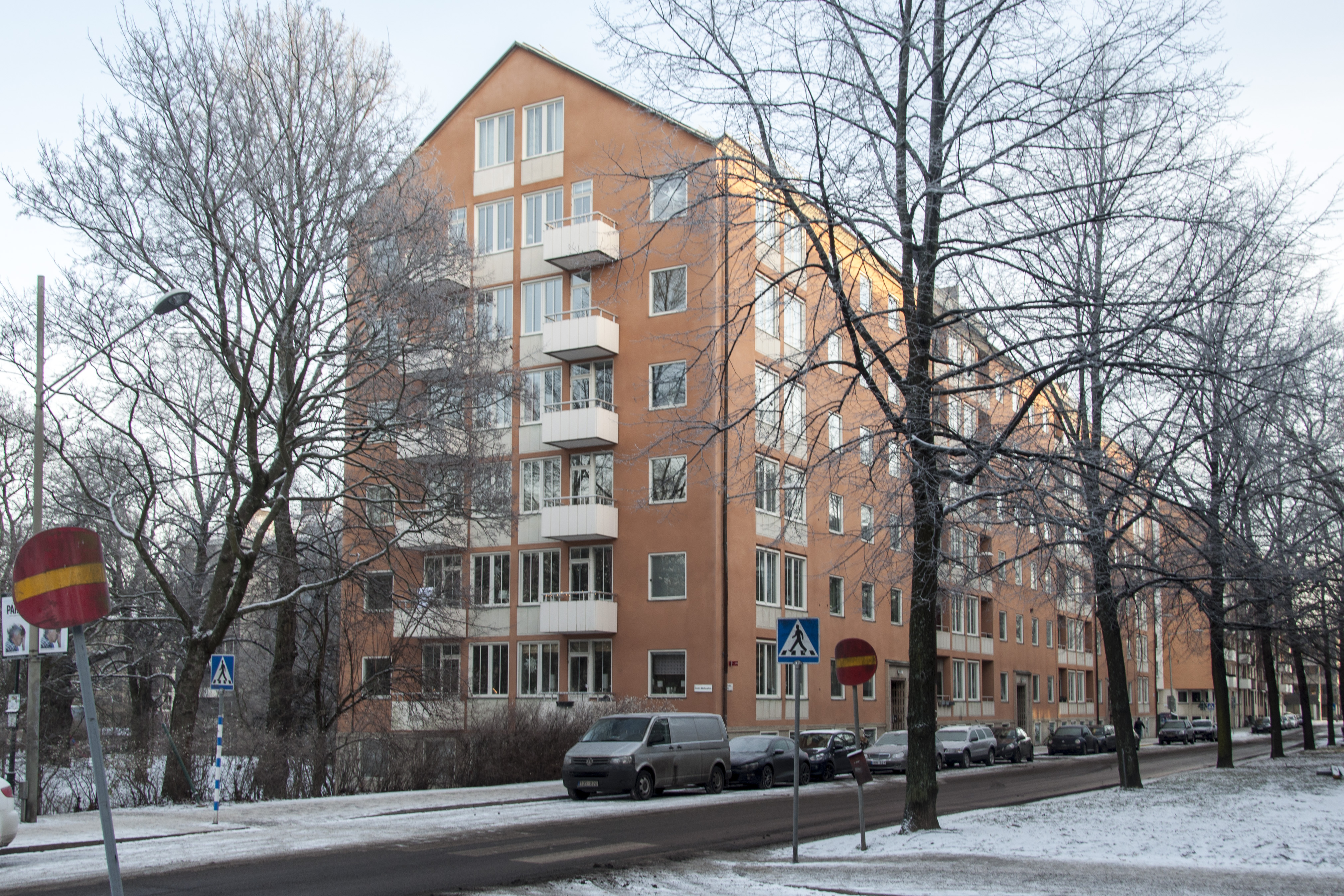 Infanteristen 8, Stockholm Karlavägen 117, Nybyggnadsår 1958, Erik Hagthorpe (Byggmästare) Nils Rasing (Arkitekt)Statstjänstemannaförbundet (Byggherre)